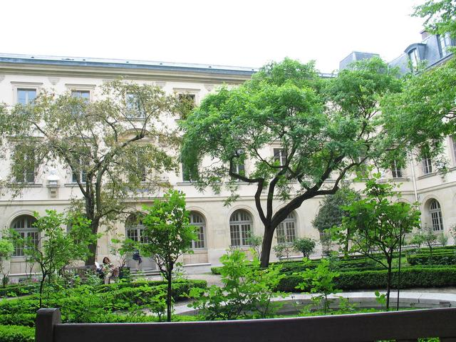 Cours aux Ernests, ENS - Paris Piotr P. Karwasz Publiée sous la licence GFDL. Piotr P. Karwasz